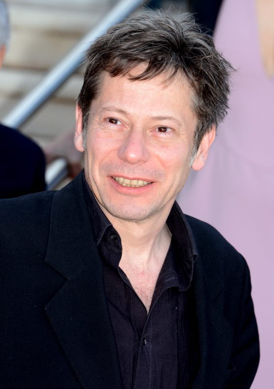 Mathieu Amalric au festival de Cannes